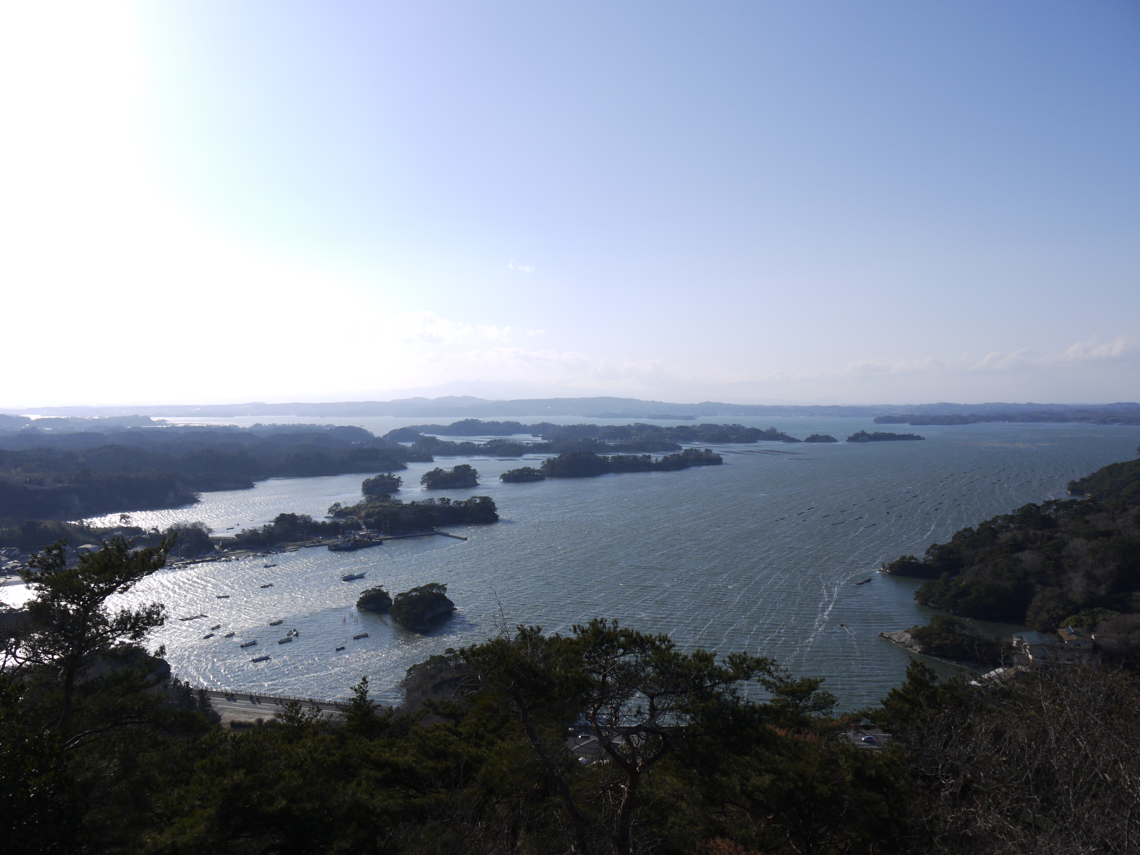 松島四大観 大高森より松島湾を望む